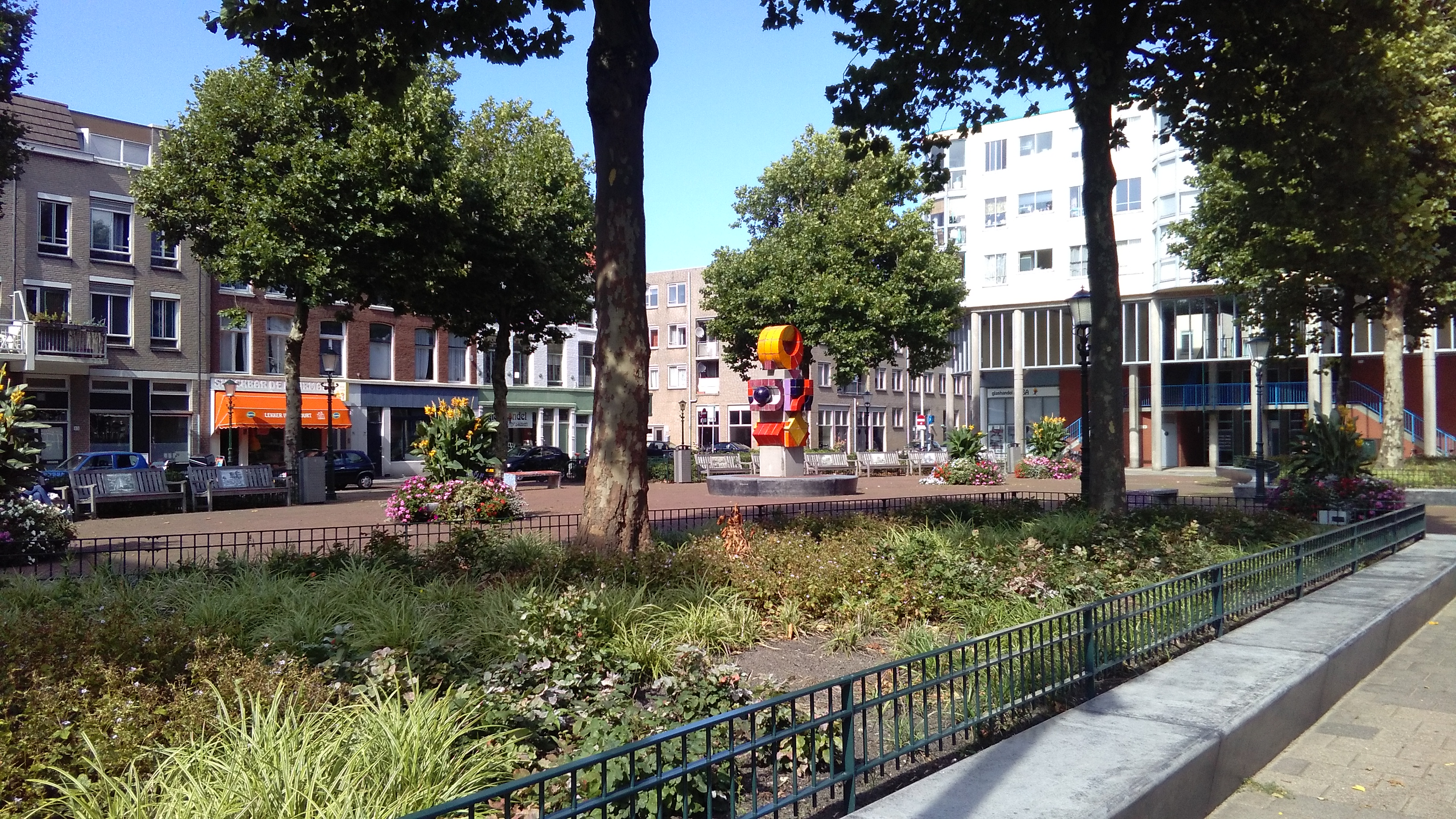 Overzicht van het Elandplein anno 2016.